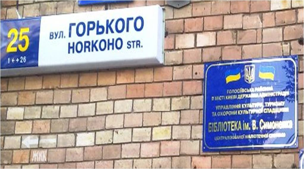 Адреса